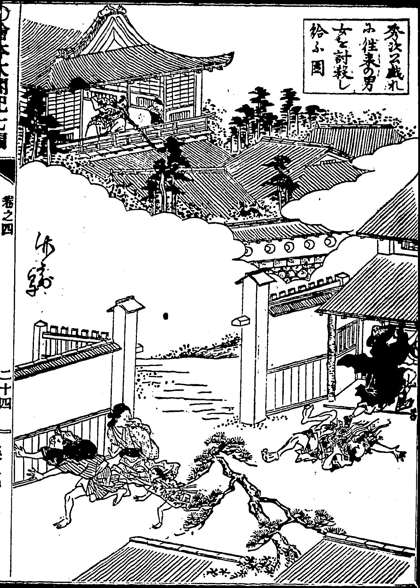 『絵本太閤記』の一場面。（絵：岡田玉山）